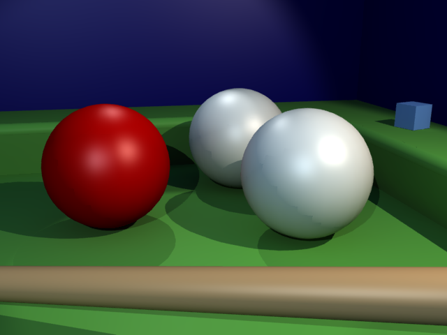 Description Attributen van het biljartspel doedermaarmeewatjewil Attributen van het biljartspel